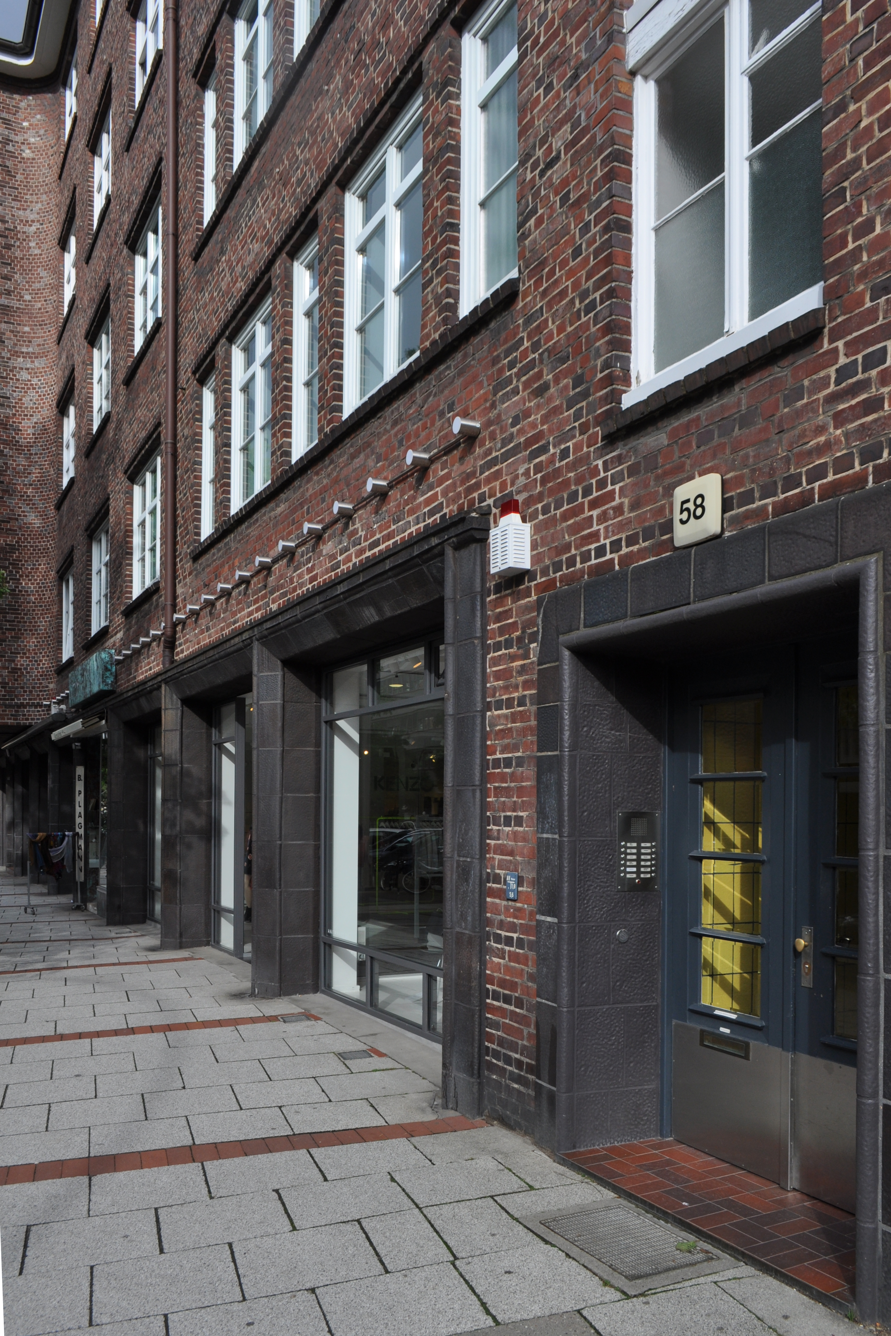 Siedlungsbau/Geschäftshaus Eppendorfer Landstraße 58 in Hamburg-Eppendorf. This is a photograph of an architectural monument.